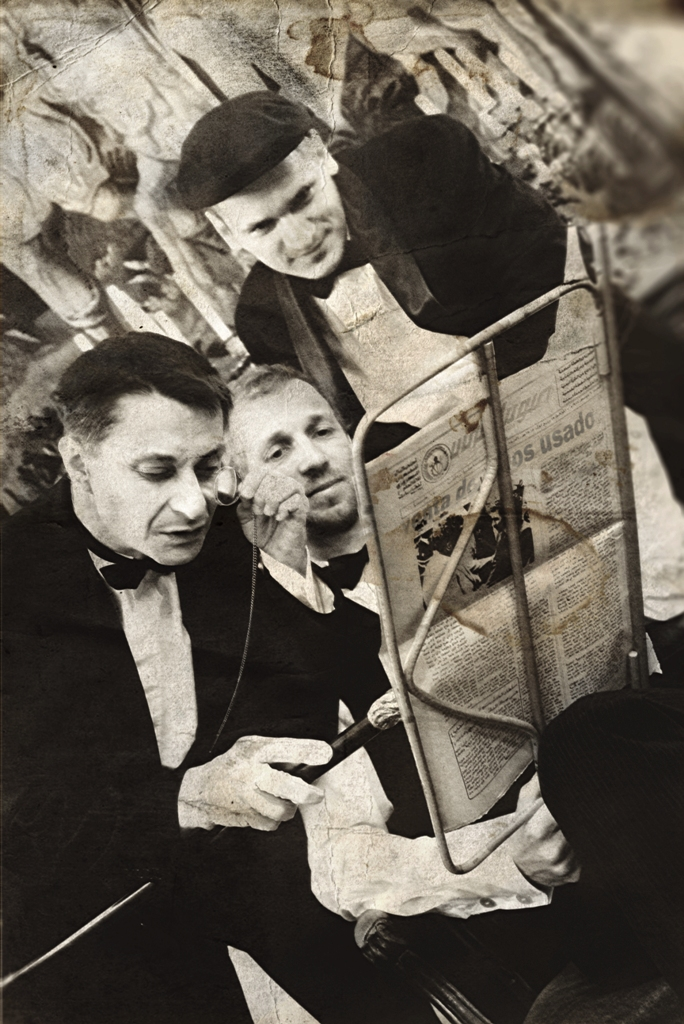 Császár Márta (Kifra): Mojo WorKings trió 2015